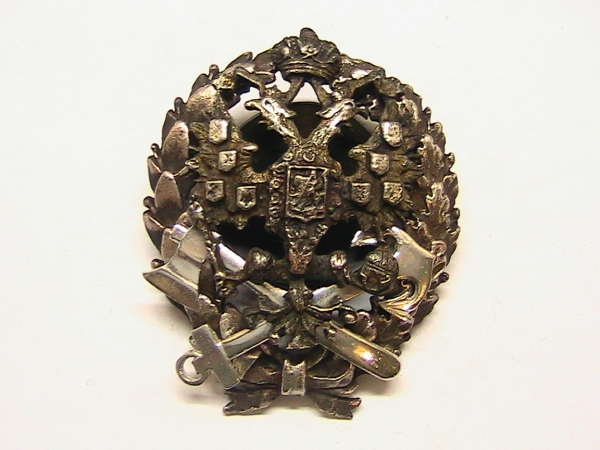 Знак для окончивших Институт инженеров путей сообщения Императора Александра I в Санкт-Петербурге